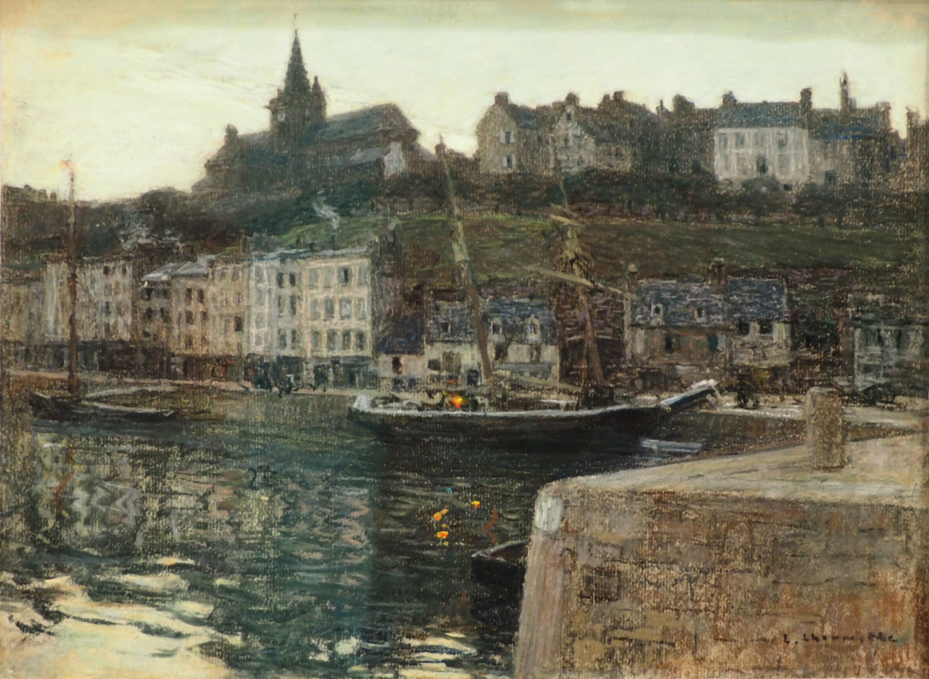 Der Hafen von Granville am Abendlabel QS:Lde,"Der Hafen von Granville am Abend"